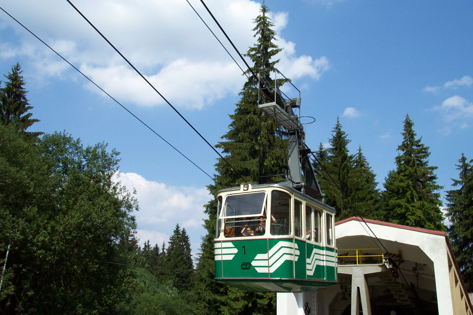 Ještěd's cable car's car - Ještěd, dolní stanice lanové dráhy, kabinka lanové dráhy